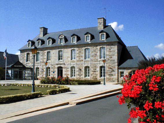 Langoad Maerdi Reter